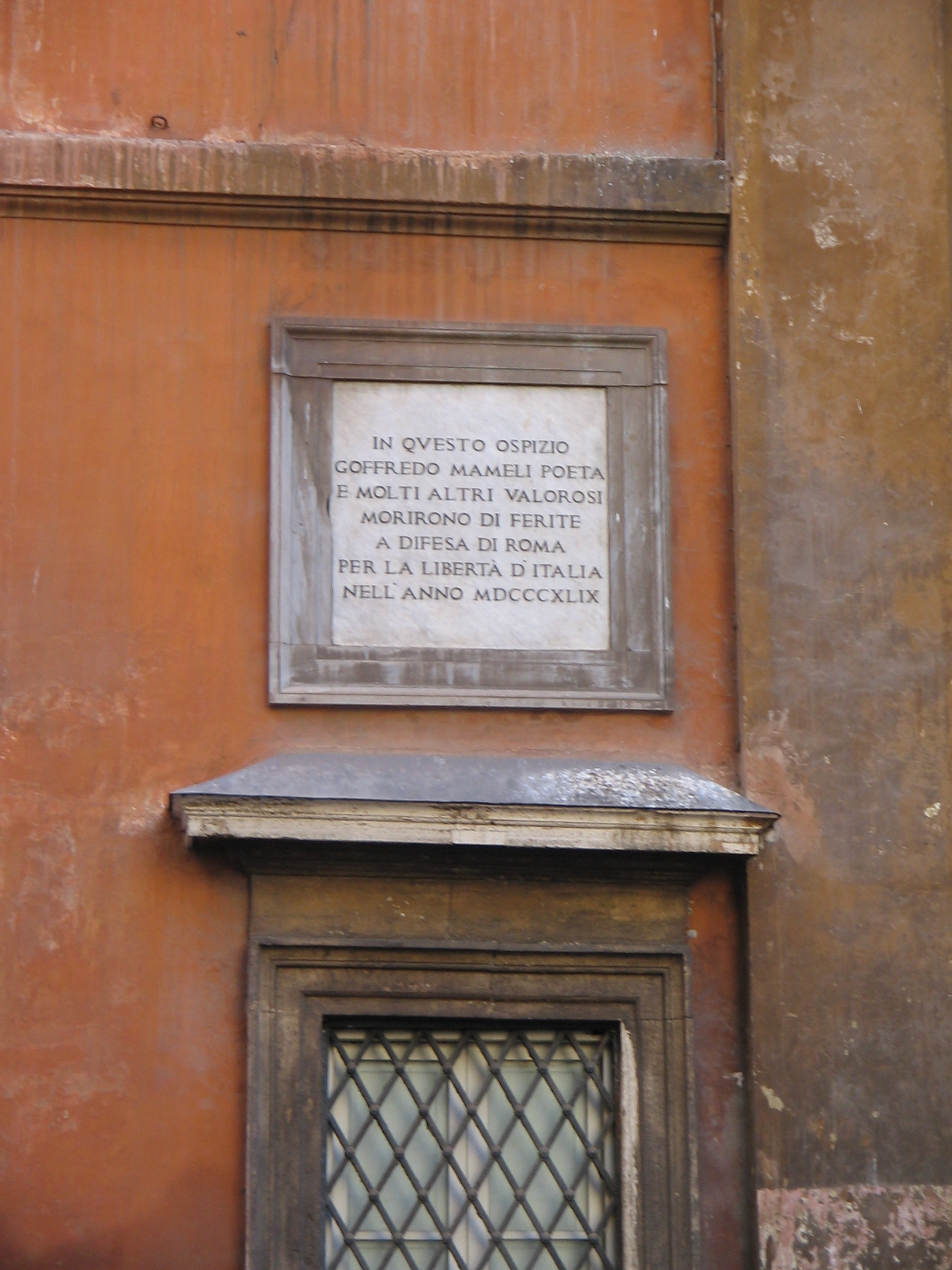 Lapide a Goffredo Mameli e a coloro che nel 1849 qui morirono combattendo per la difesa della Repubblica Romana, a Trinità dei Pellegrini a Roma.